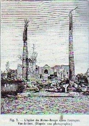 Vue des ruines de l'église Notre-Dame de la Délivrande du Morne-Rouge après le passage du cyclone du 18 août 1891